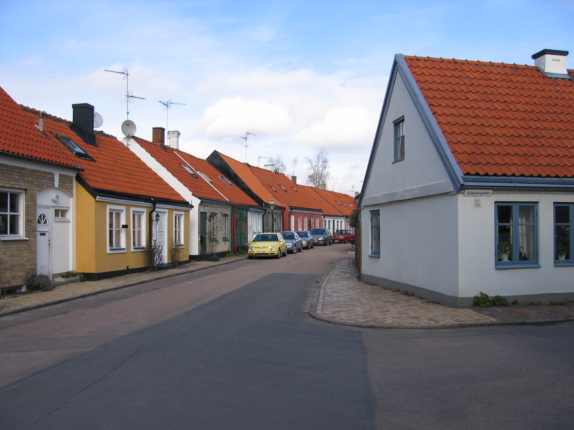 Landskrona